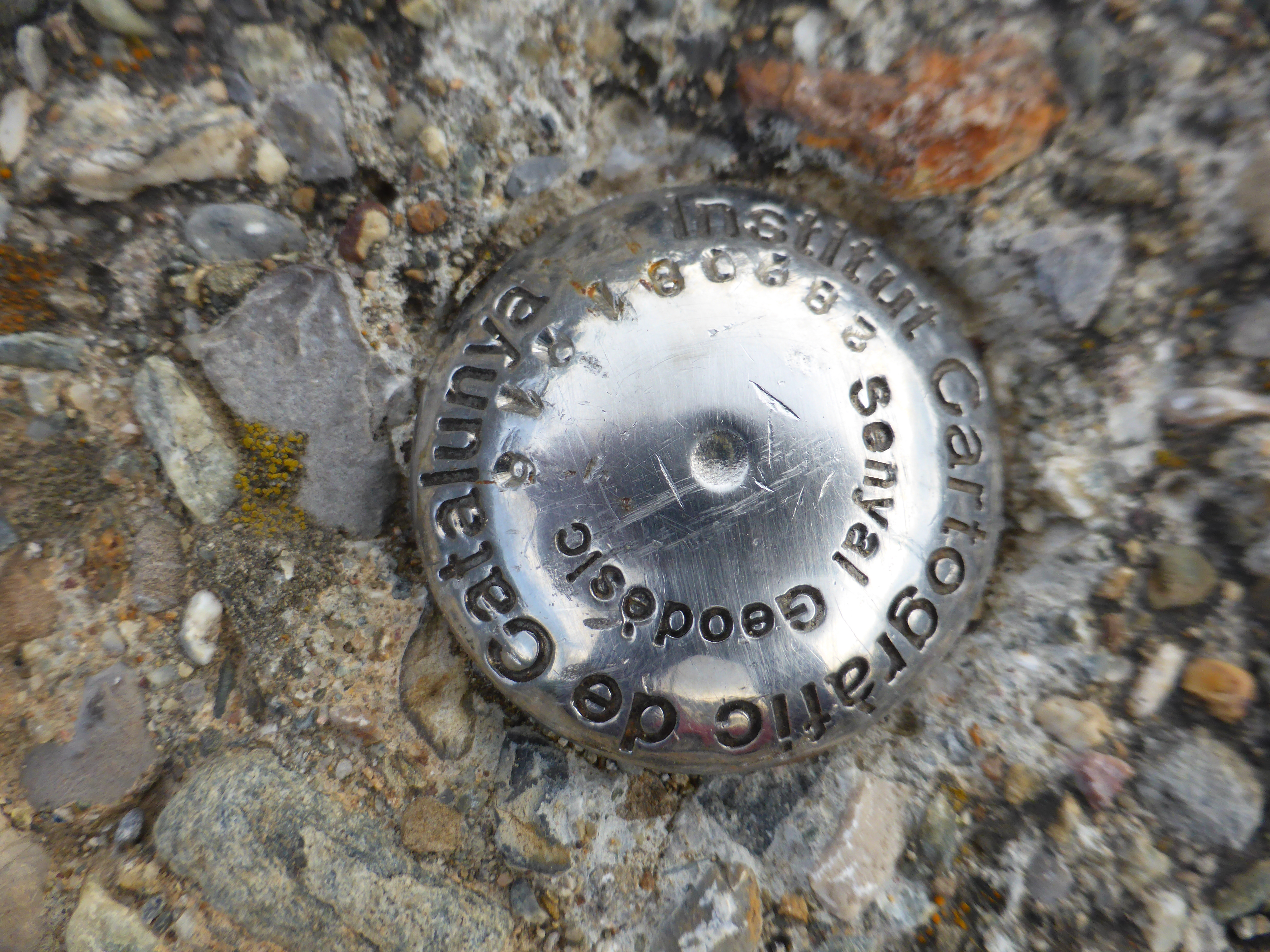 Senyal geodèsic - Ribes Altes - Verge Neus